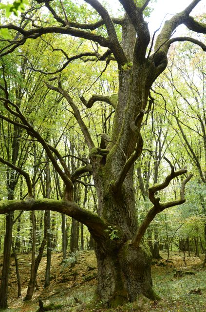 Symbol planiny Dolný vrch - dub pri studni Köves fertés-kút (Kamenná bahnitá studňa) v tzv. Lese mŕtvych obrov. Jeho vek sa odhaduje na 600 rokov.